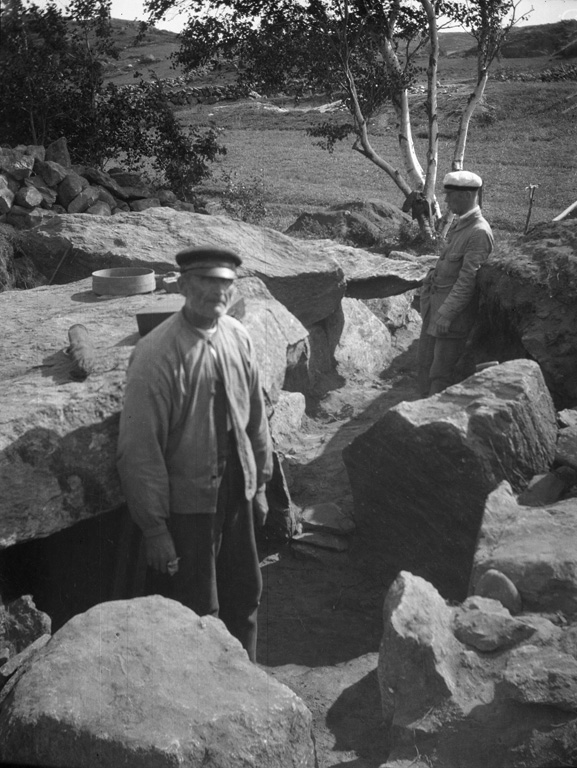 Två män vid gånggrift under utgrävning. Tegneby 28:1. Motiv: Leby Nyckelord: Riksintressen Kategori: Arbetsmotiv, Stenkammargrav Två män vid gånggrift under utgrävning. Tegneby 28:1.